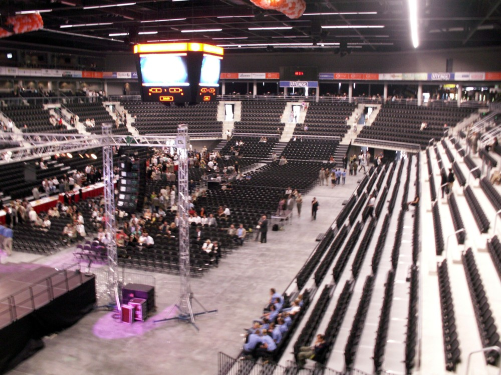 Šiaulių arenos vidus